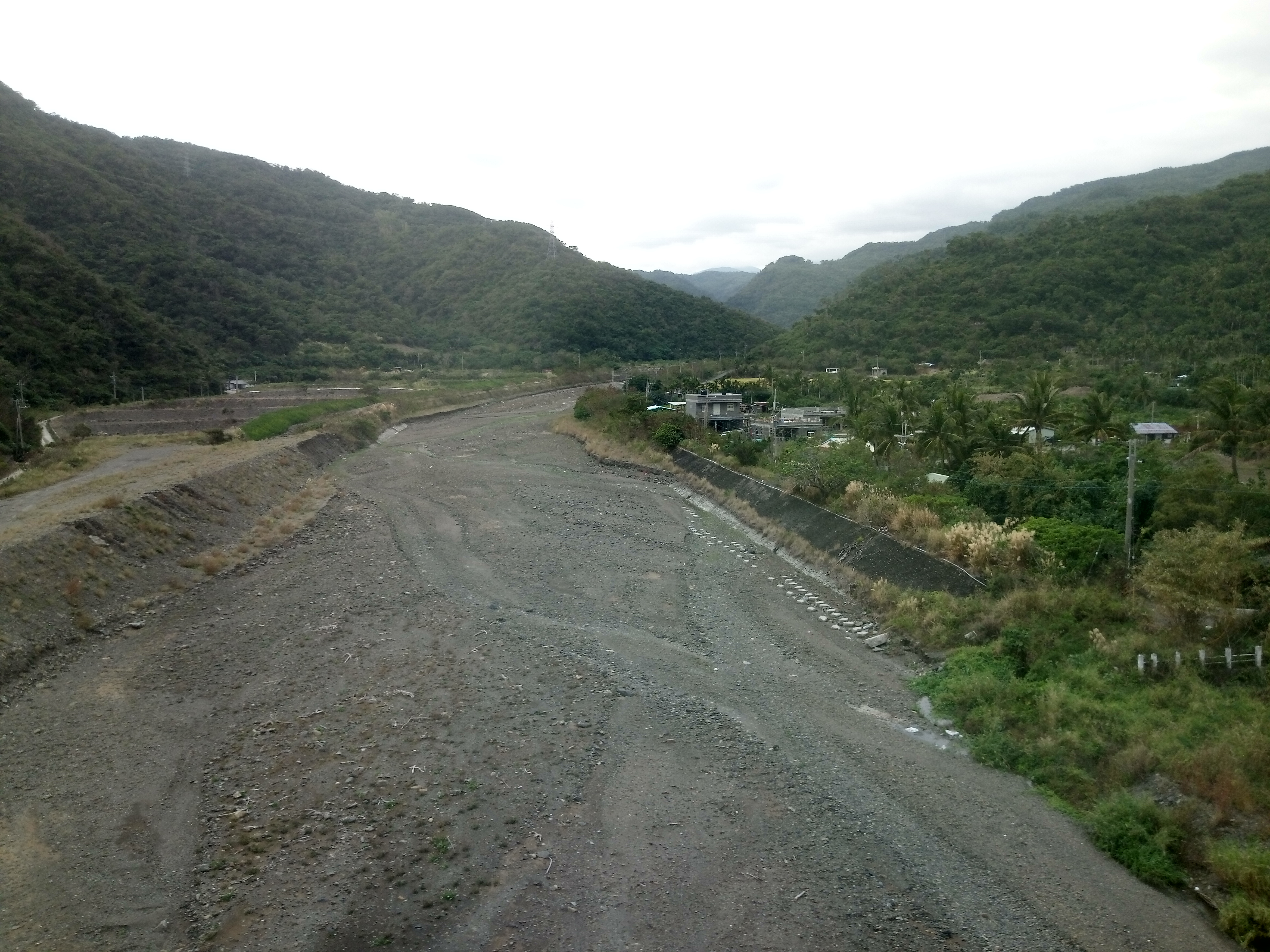 臺灣臺東縣烏萬溪